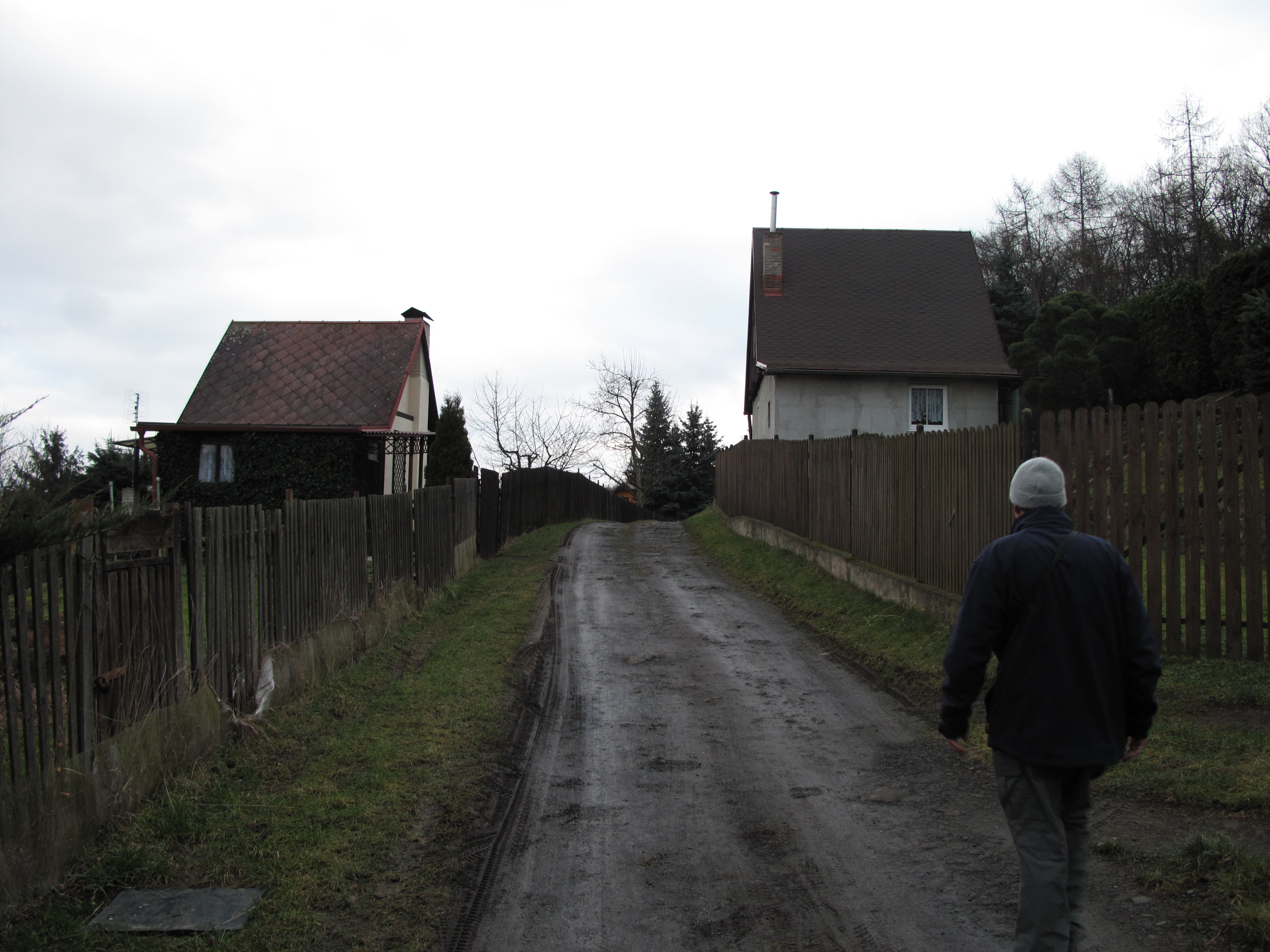 Cesta v Němečkách. Okres Teplice, Česká republika.